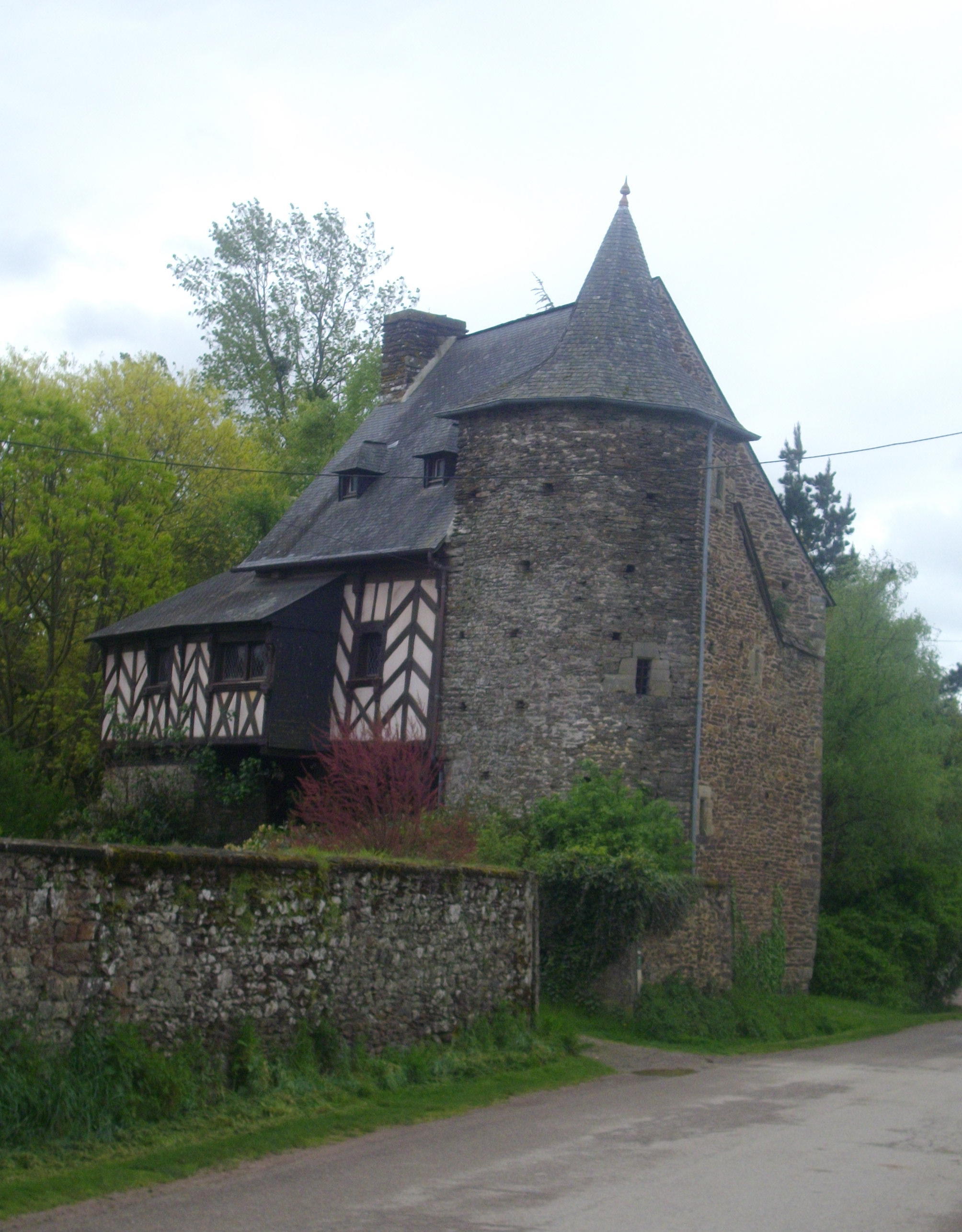 Le manoir des Rues-Neuves ou château de Gurwan